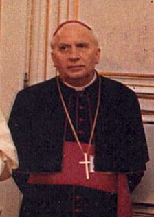 Mgr Charles-Amarin Brand, archevêque de Strasbourg le 9 octobre 1988 (voir)